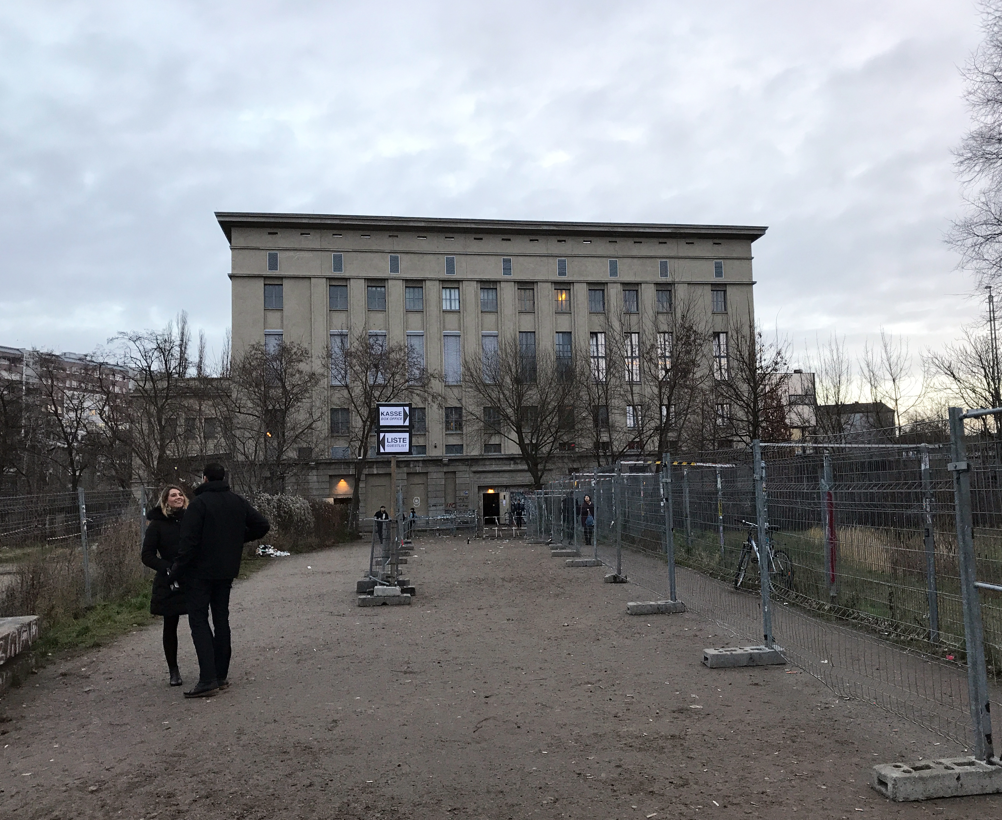 Berghain / Panorama Bar / Säule